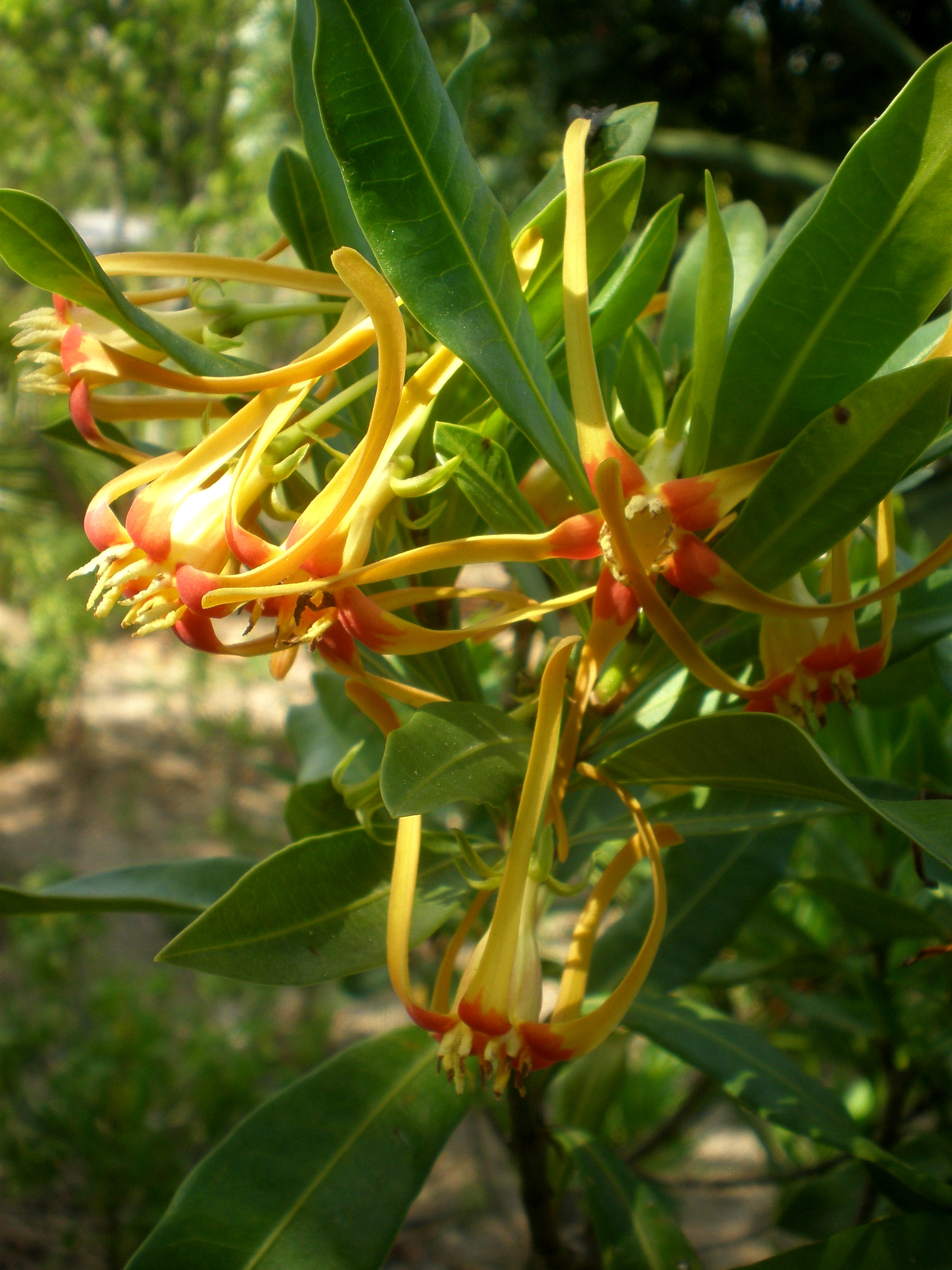 Jardín Botánico de Barcelona.